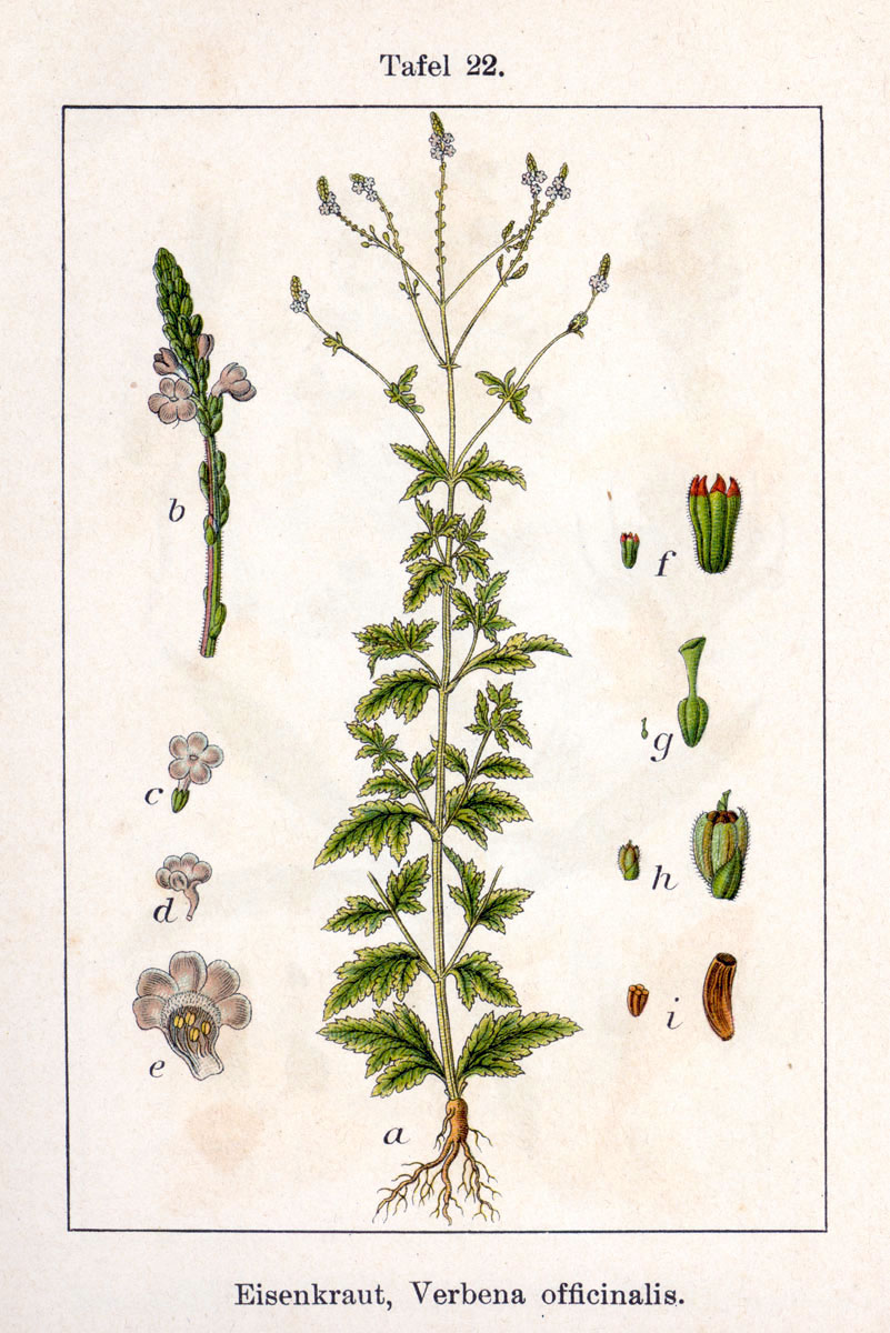 Verbena officinalis L. Original Description Eisenkraut, Verbena officinalis